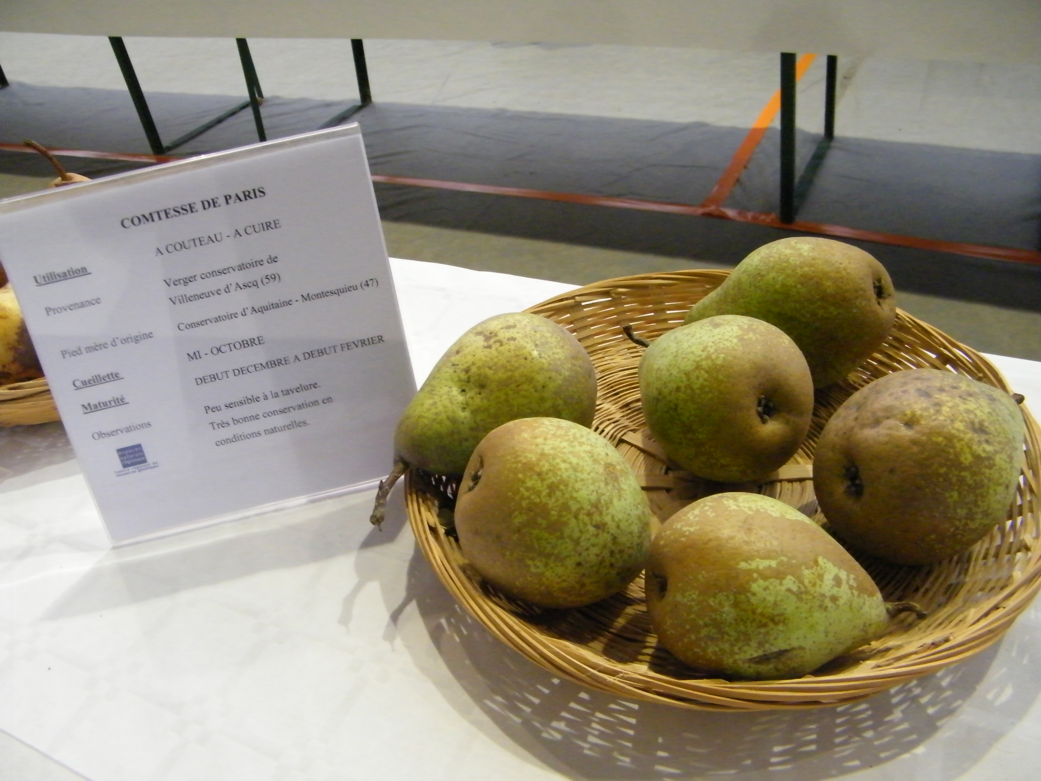 Comtesse de Paris, variété de poire, Ailly-le-Haut-Clocher, Somme, Fr, Apple festival 03et04-11-2018 (60)